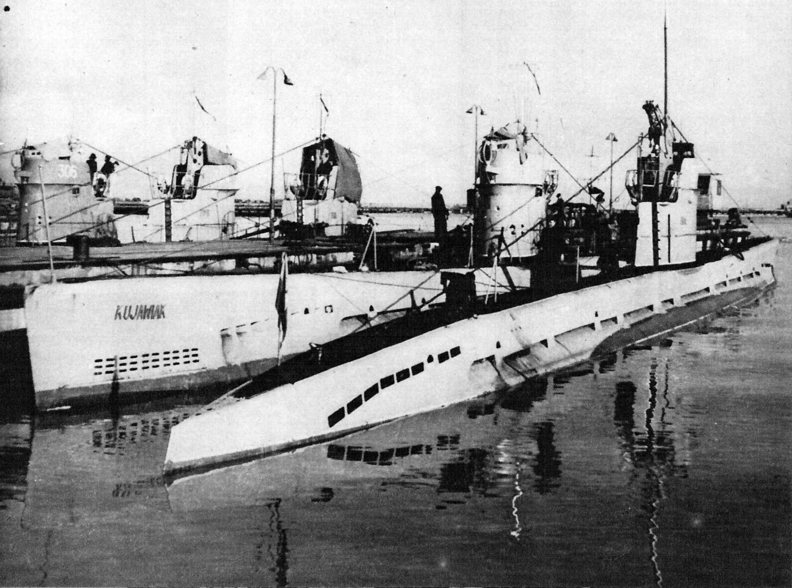 Polskie okręty podwodne typu M (drugi z prawej - ORP "Kujawiak", pierwszy z lewej - ORP "Kurp")